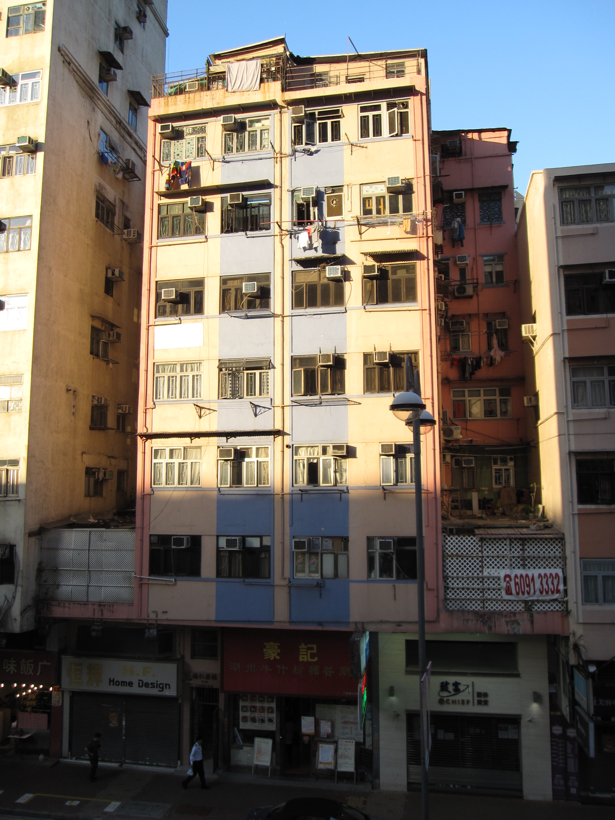 中文（香港）: 德仁唐樓第六期。